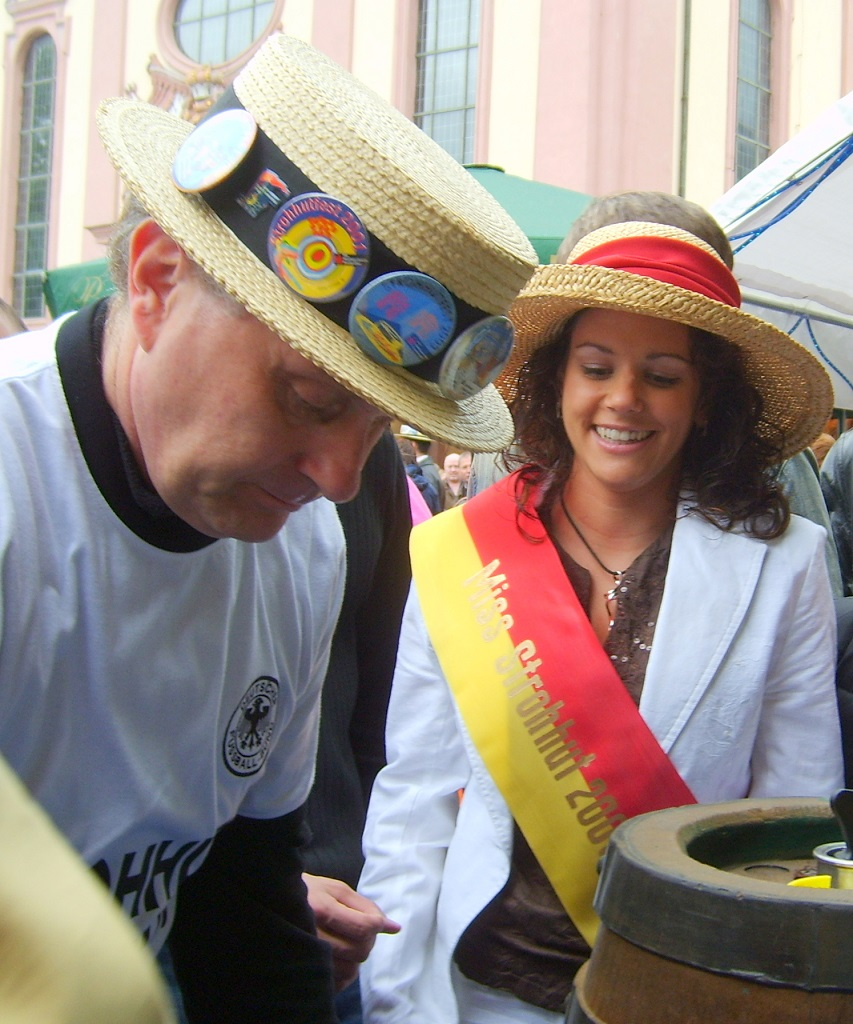 Strohhutfest 2006, Anstich mit OB Theo Wieder und Miss Strohhut Corinna Metzger